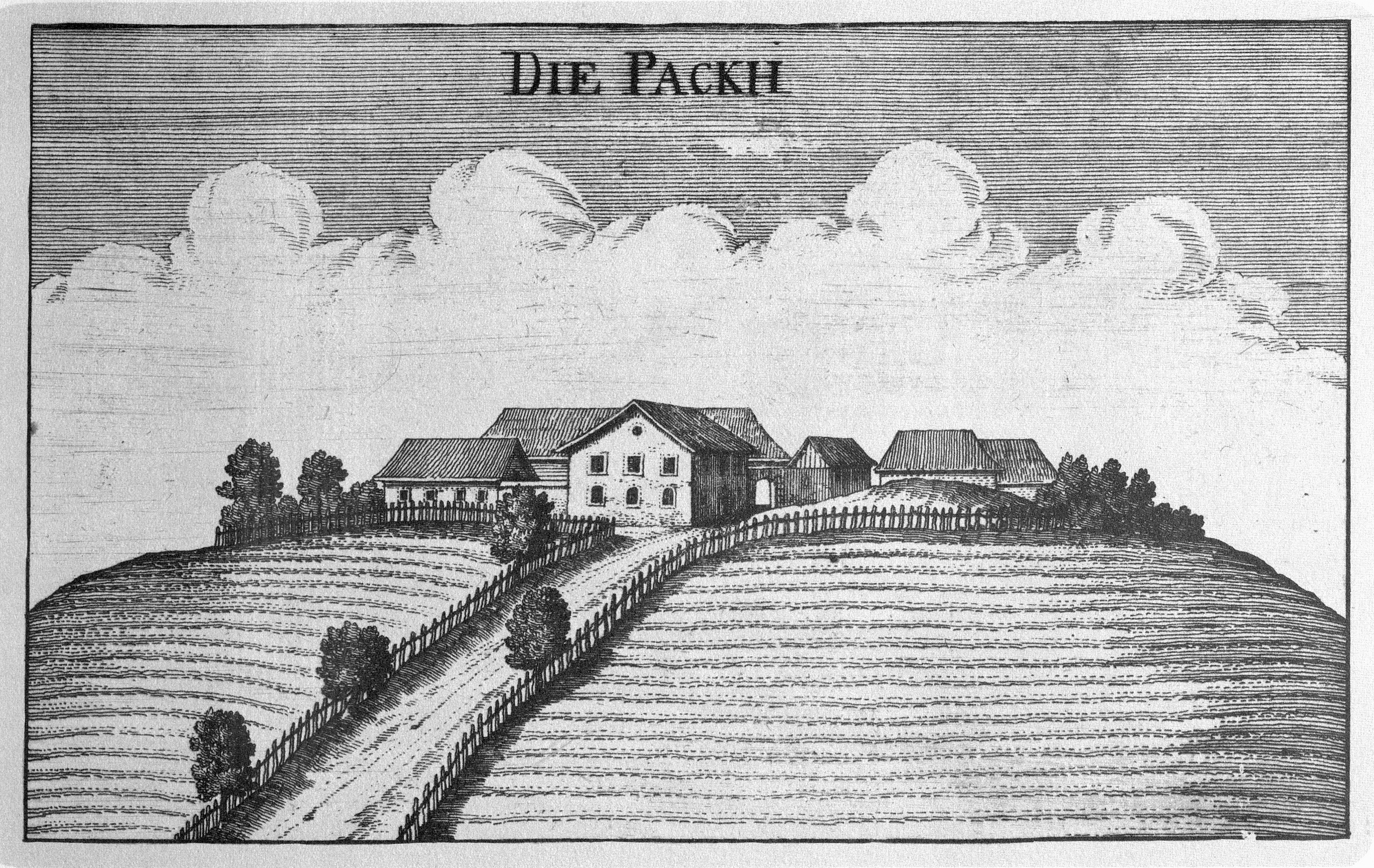 G. M. Vischers Käyserlichen Geographi, Topographia Ducatus Stiriae, Das ist: Eigentliche Delineation / und Abbildung aller Städte / Schlösser / Marcktfleck / Lustgärten / Probsteyen / Stiffter / Clöster und Kirchen / so es sich im Herzogthumb Steyrmarck befinden; Und anjetzo Umb einen billichen Preyß zu finden seynd Bey Johann Bitsch Universitäts Buchhandlern / Auff dem Juden=Platz bey der guldenen Saulen. Graz 1681 Die Nummerierung der Dateien folgt der alphabetischen Reihung der Ortsnamen und entspricht nicht dem Vischer-Register